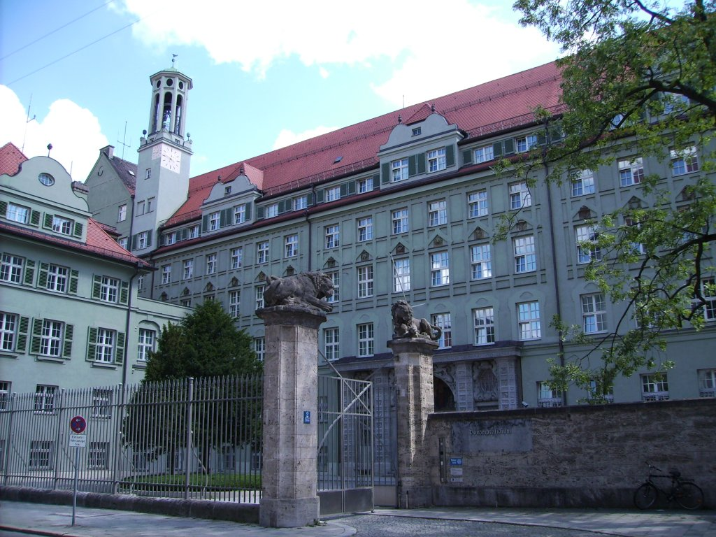 Gebäude des Polizeipräsidiums München, Ettstr. 2